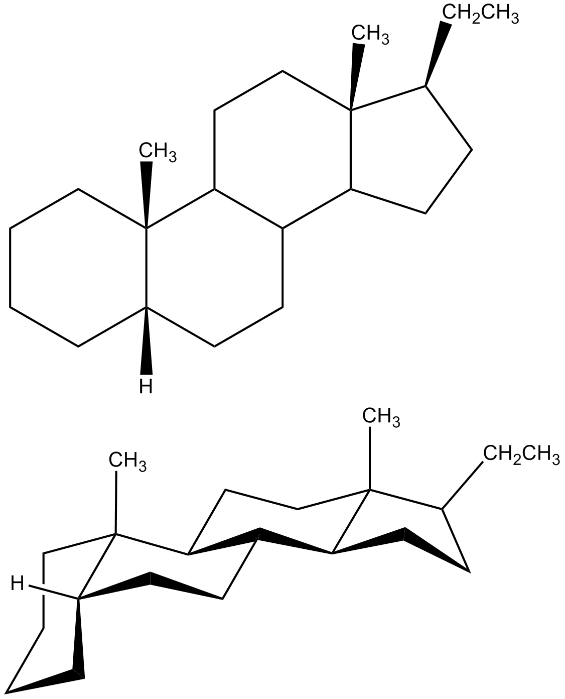 isómero 5b del pregnano